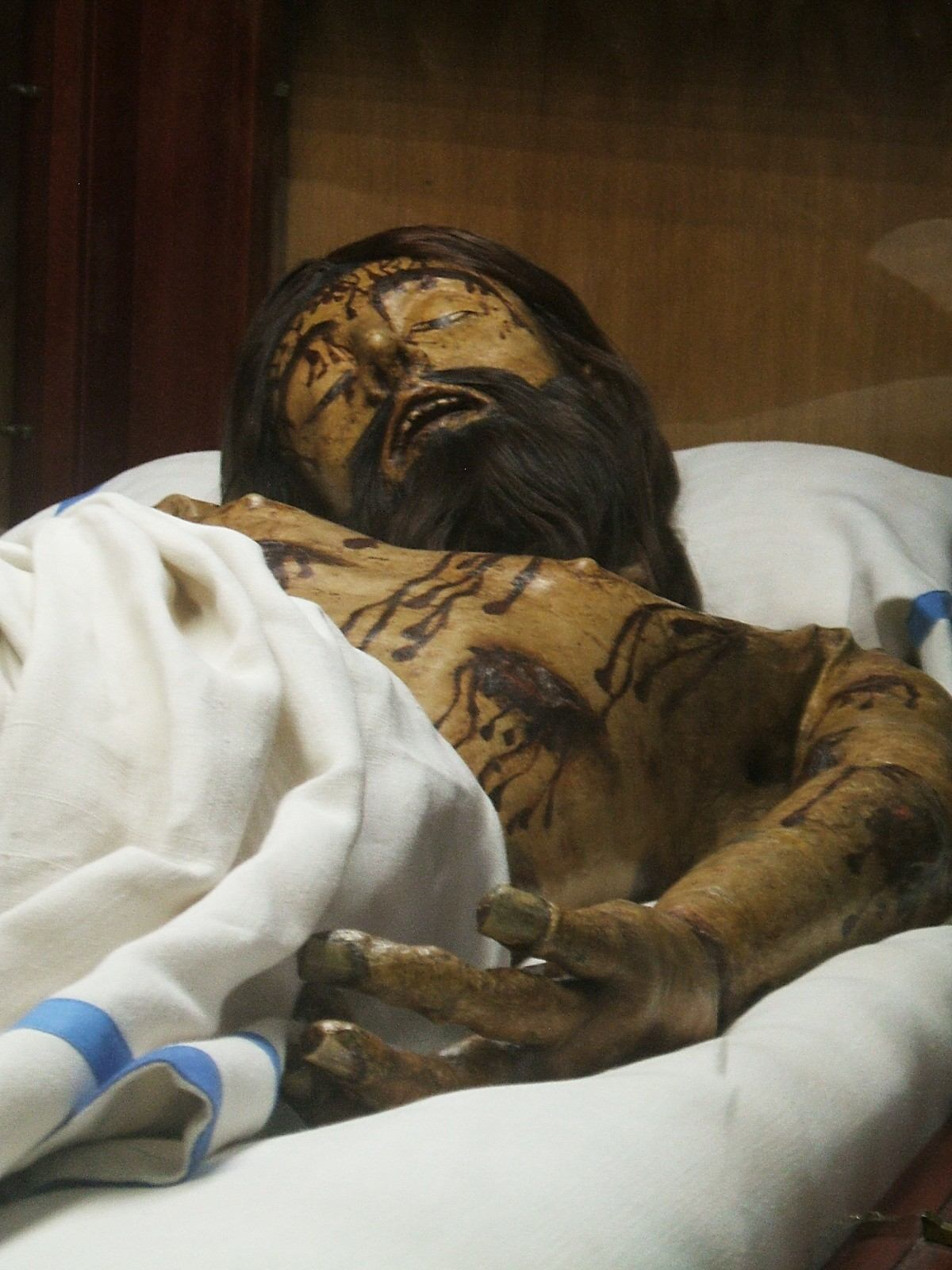 El Cristo del Monasterio de Santa Clara (s-XV), en la ciudad de Palencia, Castilla y León, España/Spain